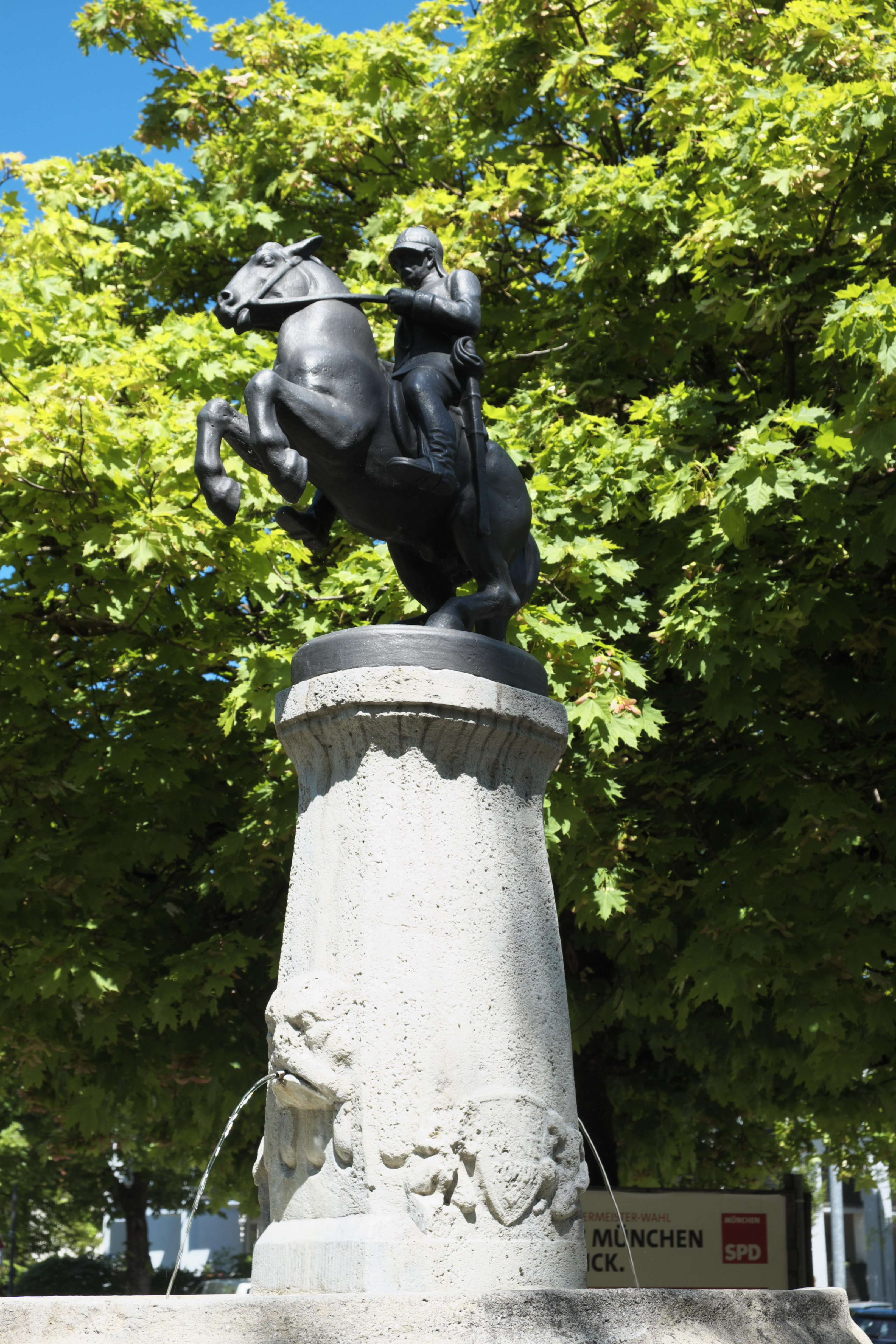 Bismarckbrunnen in Pasing im Stadtbezirk Pasing-Obermenzing in München (Bayern/Deutschland), mit kleinem Reiterstandbild von Otto von Bismarck, 1914 von Josef Flossmann geschaffen